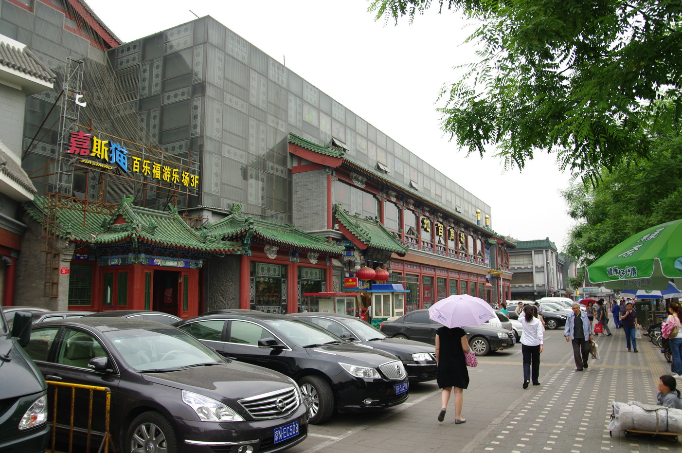 Kaufhaus in der Nähe des Trommelturms, Peking